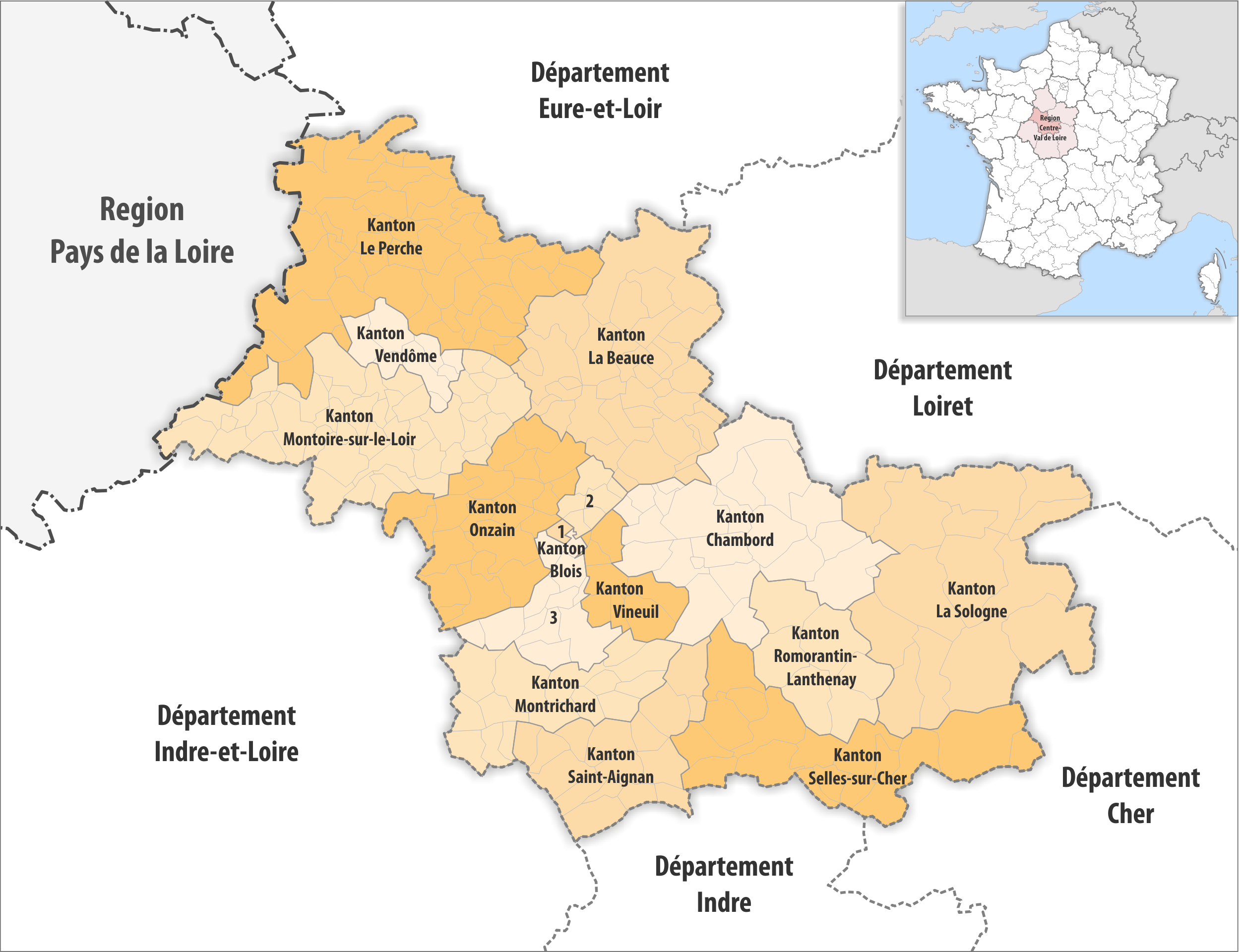 Gemeinden und Kantone im Departement Loir-et-Cher